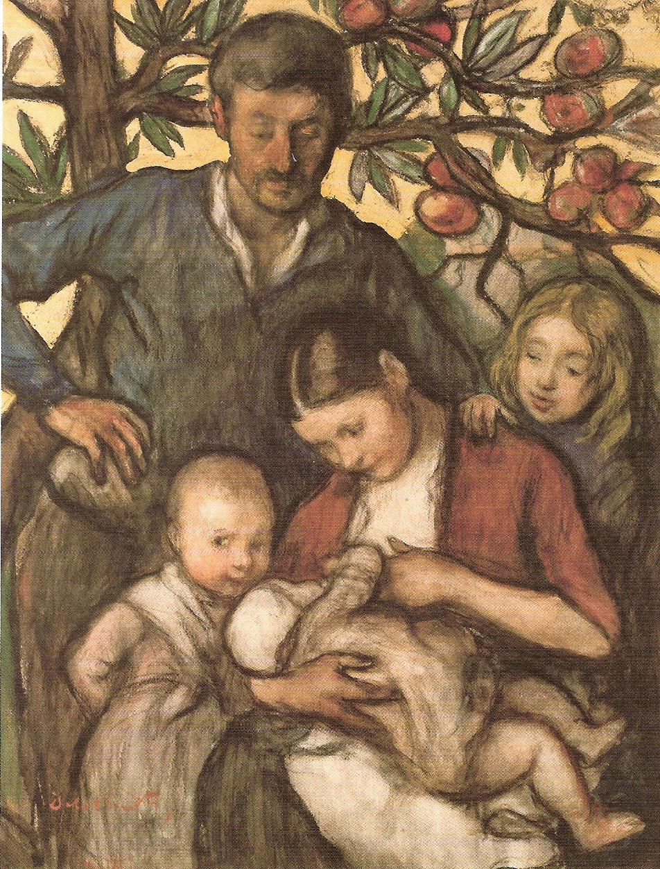 Jakob Smits, schilderij Het Gehucht, museum Jakob Smits te Mol, Belgie